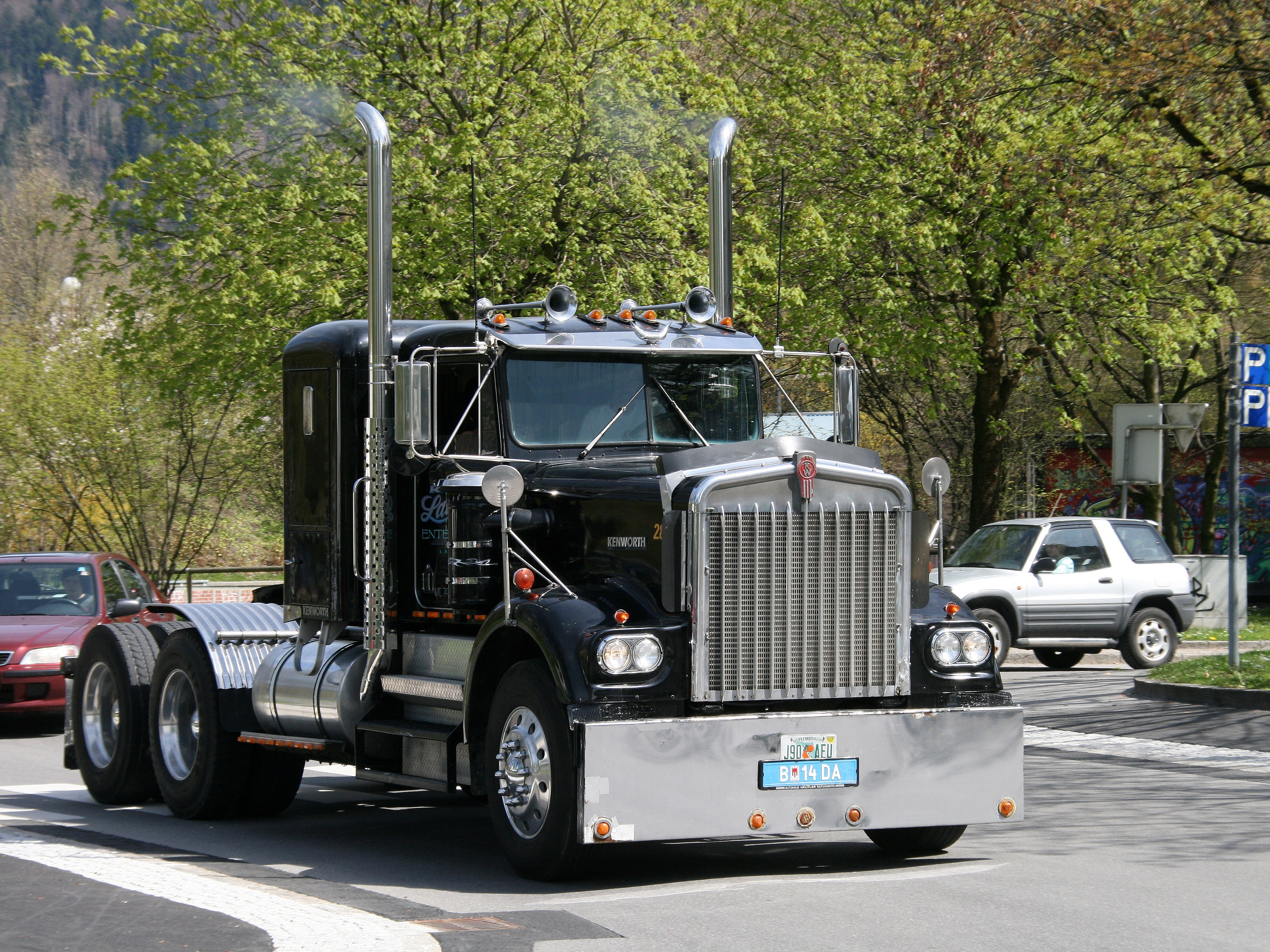 Kenworthtruck gesehen in Bregenz, Vorarlberg.